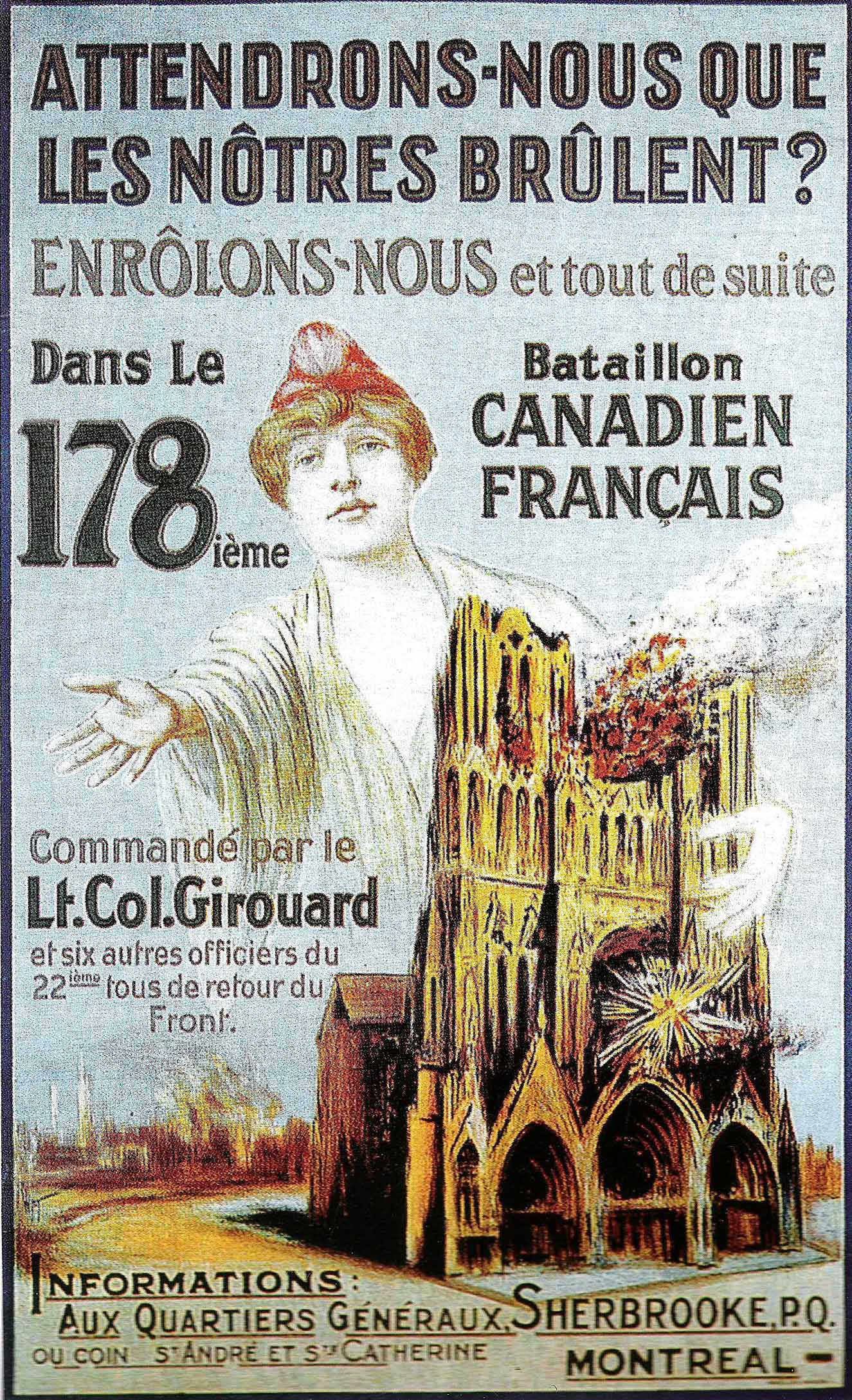 affiche pour la mobilisation au sein du 178_bataillon_canadienavec en fond la_cathédrale_Reims.